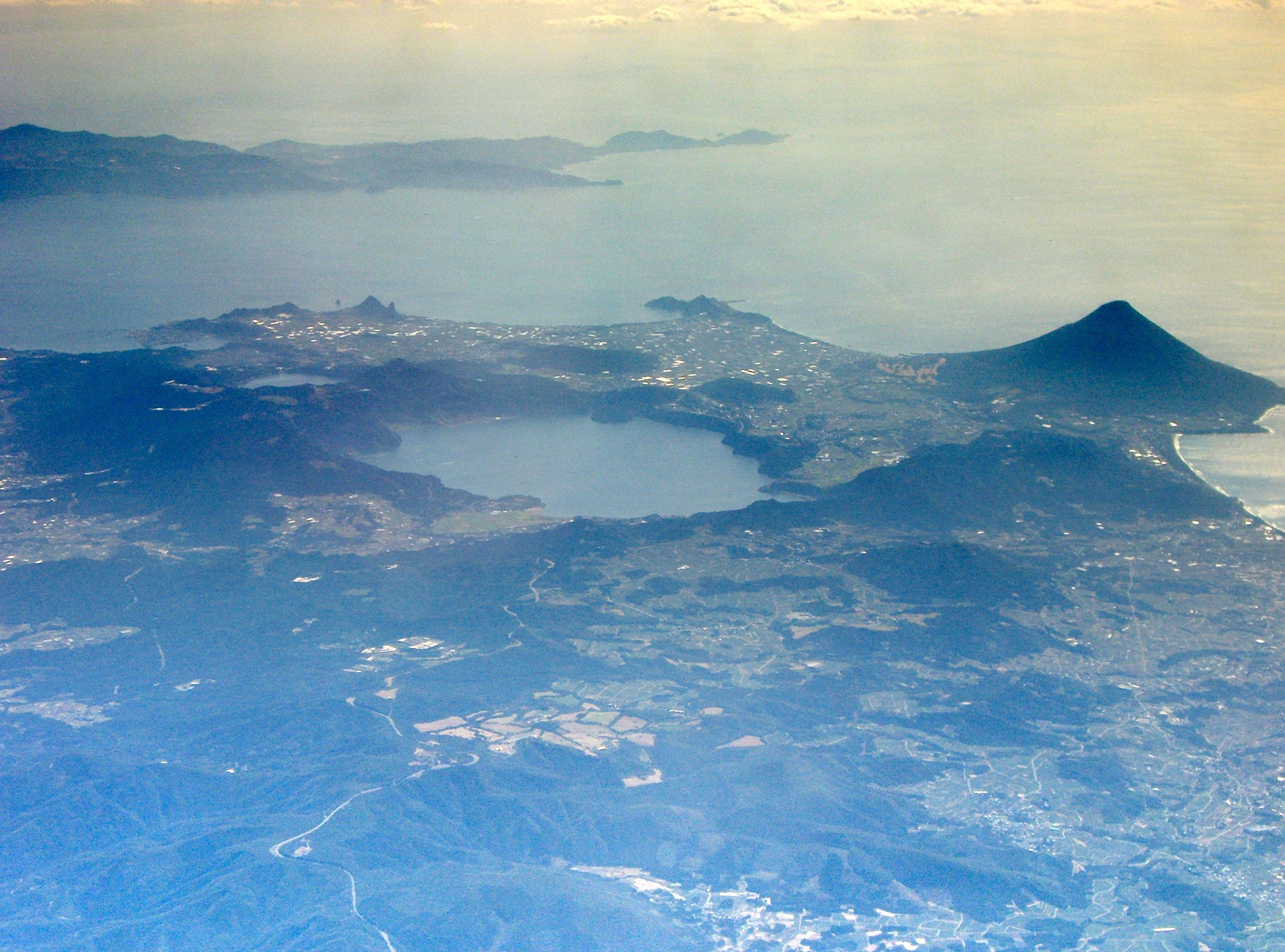 Ibusuki Volcanoes of Kagoshima, Japan. / 鹿児島県の指宿火山群(南薩火山群)。上空より撮影。